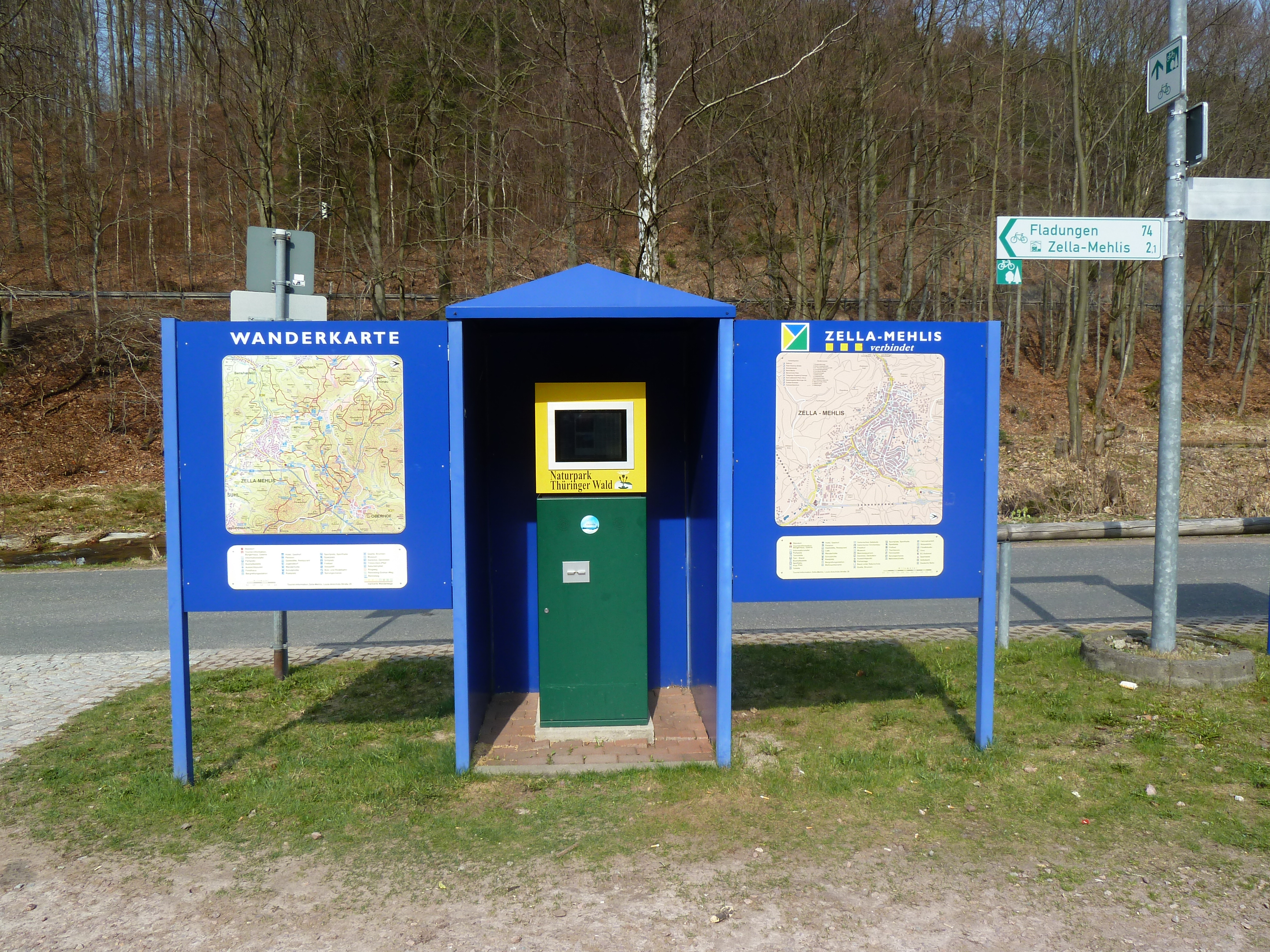 Infozentrum Naturpark Thüringer Wald in Zella-Mehlis mit Parkplatz